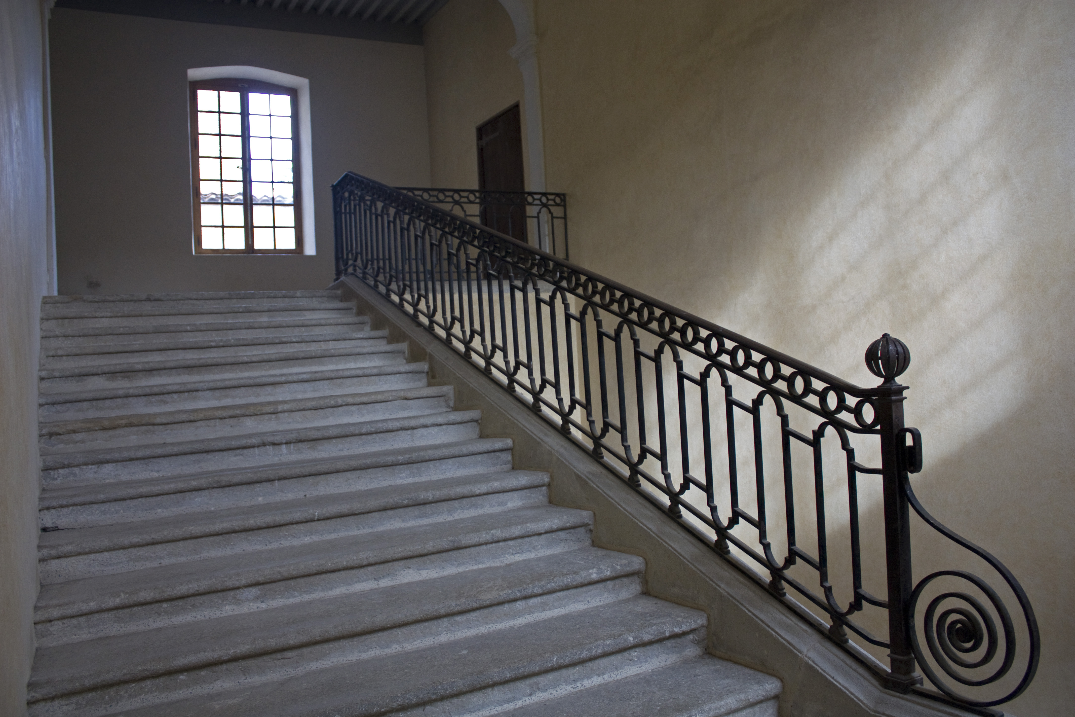 Le grand escalier, sobre et imposant, desservait l' hôtellerie des religieux de passage. De la rampe seule la Boule et la volute de tête sont XVII°